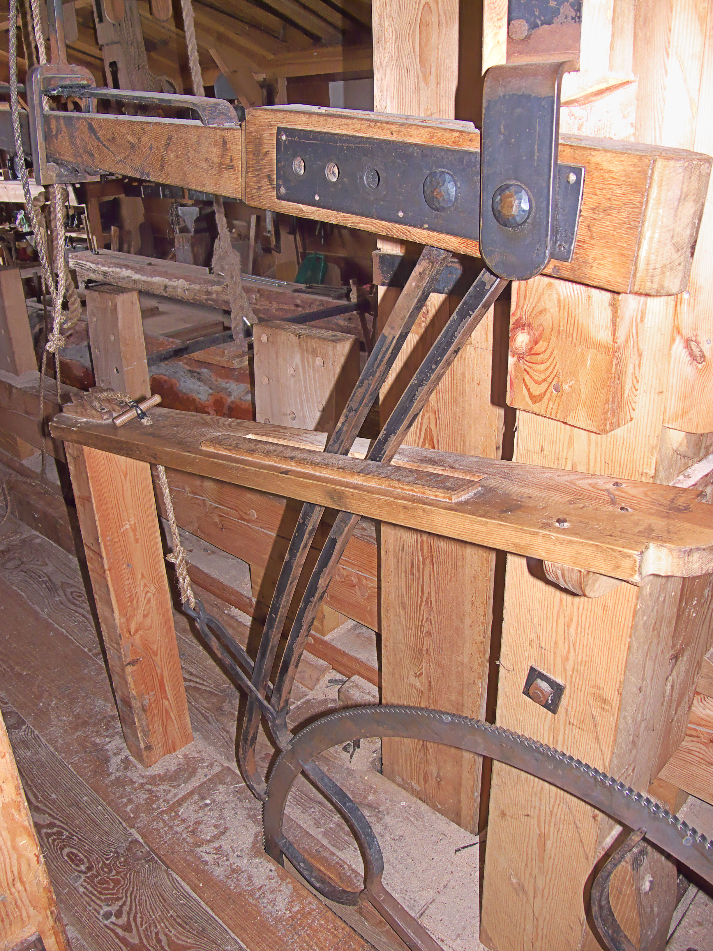 Molen Het Jonge Schaap, krabbelwerk